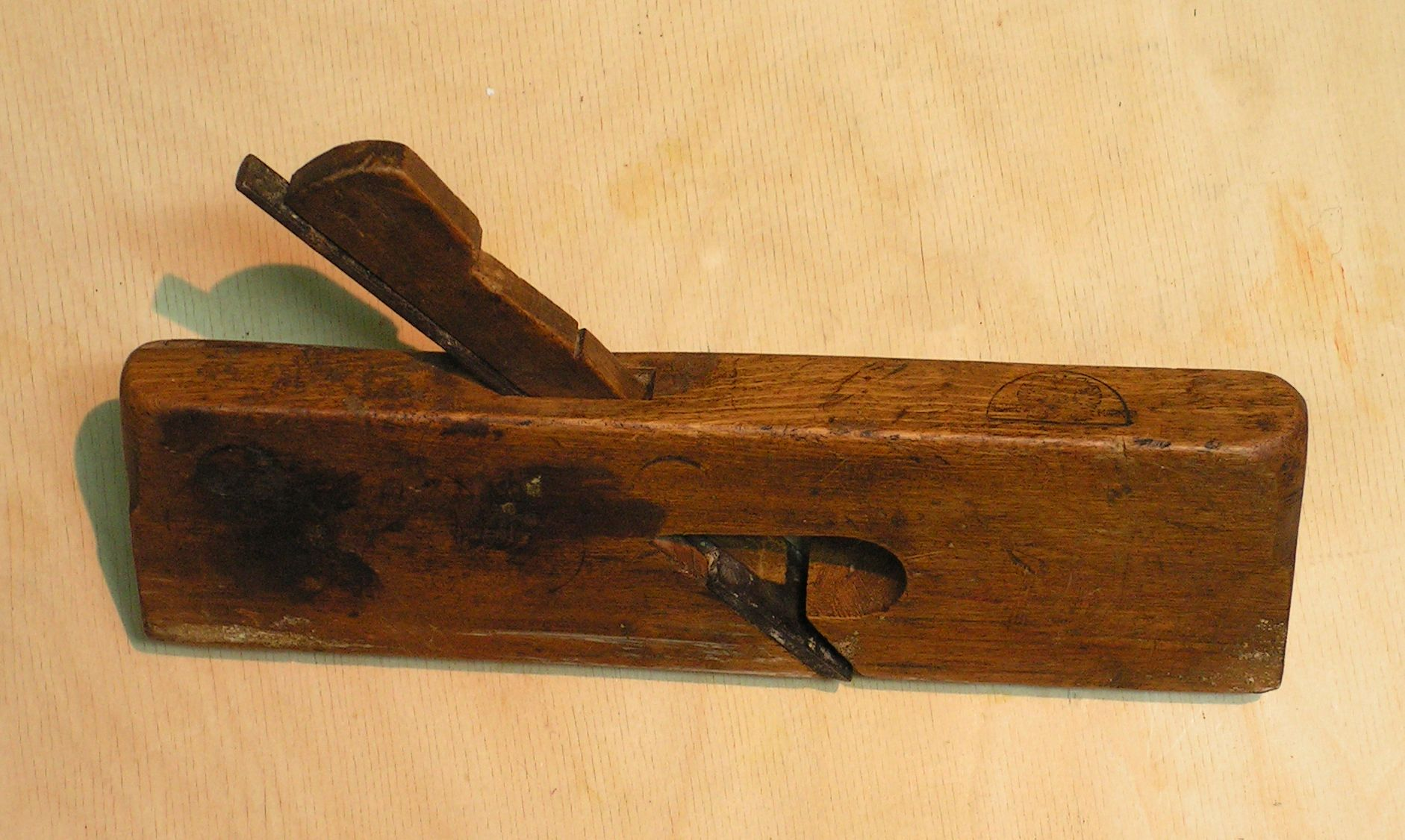 Strug kątnik. Widok z góry.